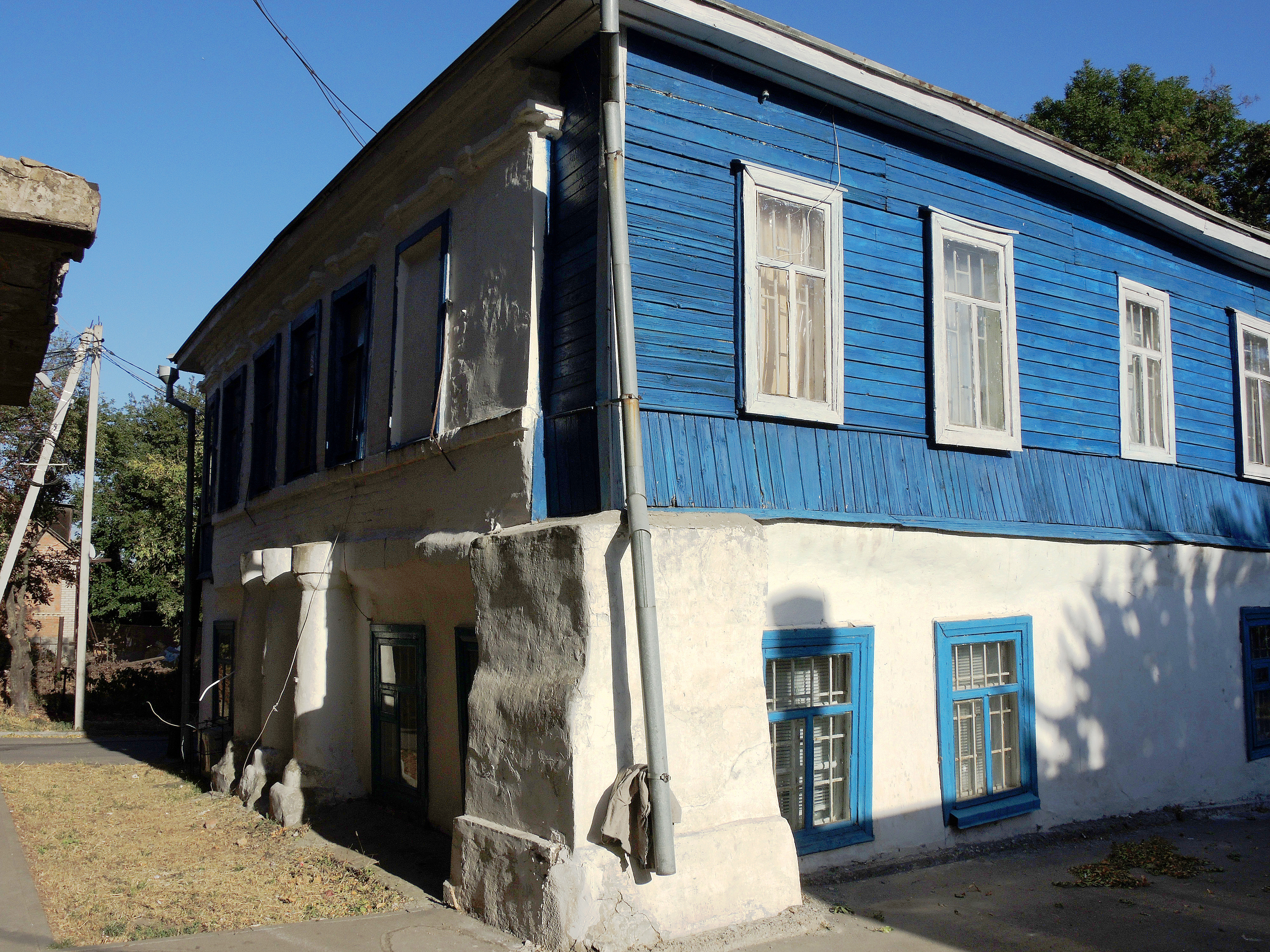 Курень зажиточного казака Рудухи, в котором жил полководец А.В. Суворов: улица Гулаева, 110, Аксай, Аксайский район, Ростовская область